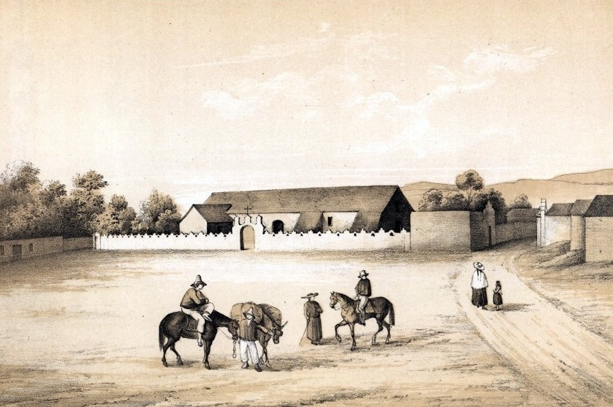 Plaza de san Pedro de Atacama por Rodolfo Amando Philippi en 1854.